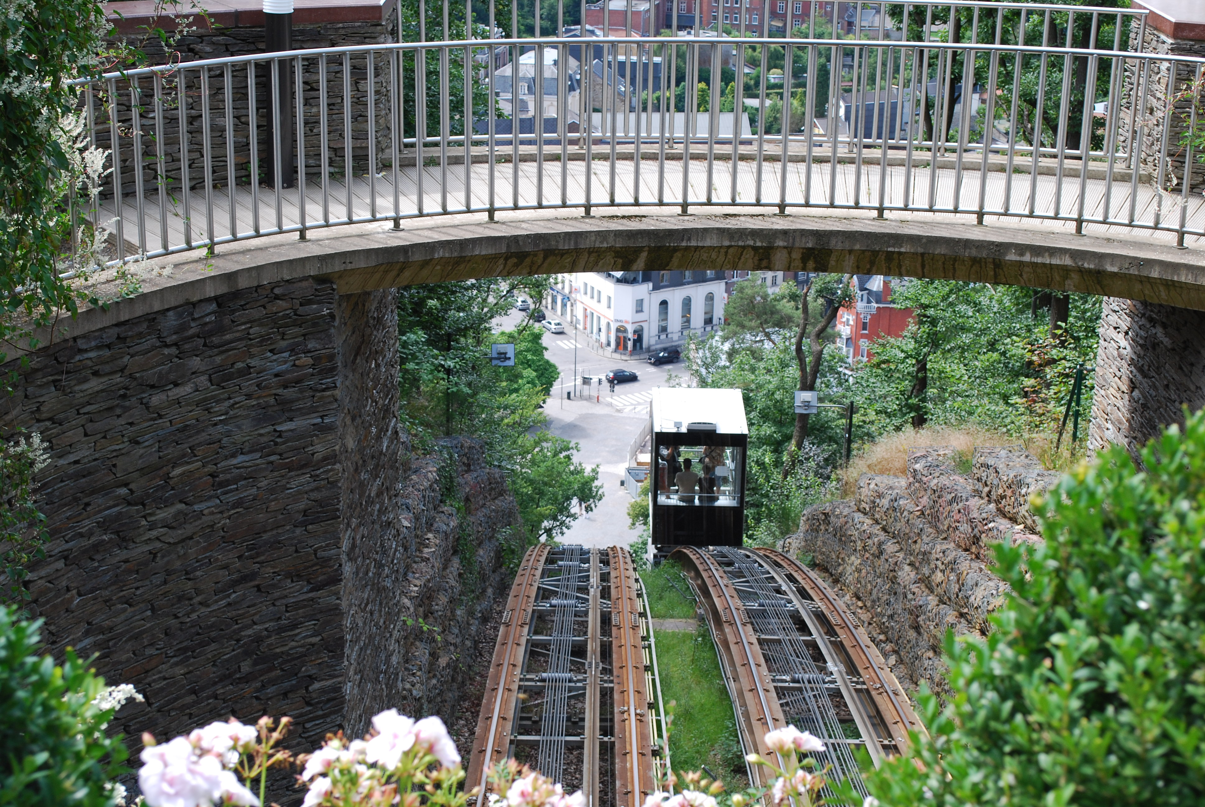 Spa Kabelspoorweg